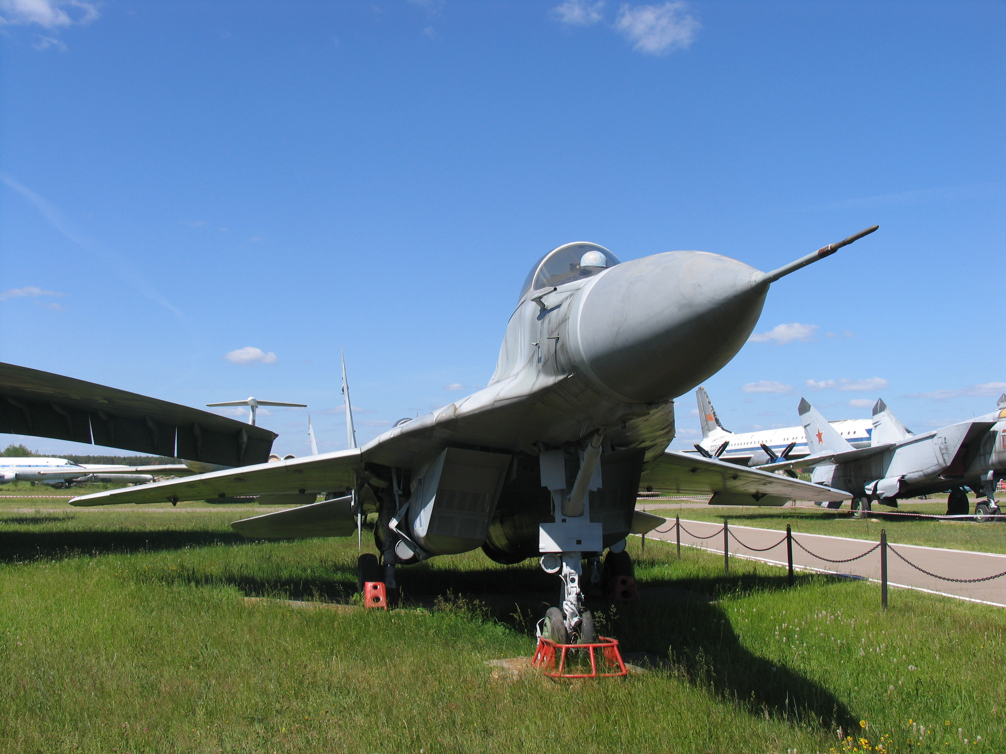 Самолёт 9-01 - первый протип истребителя МиГ-29.